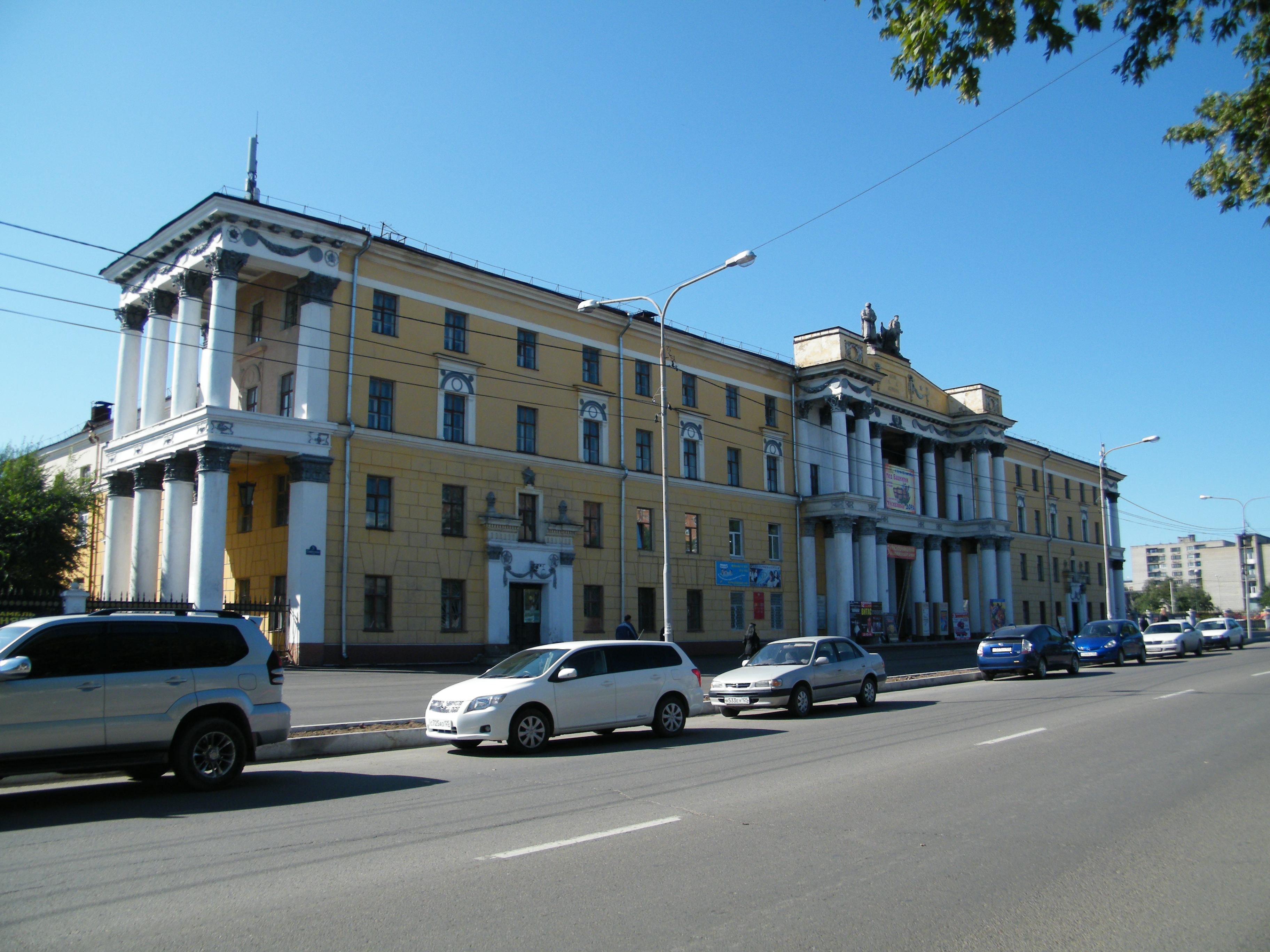 Уссурийск, Дом офицеров.